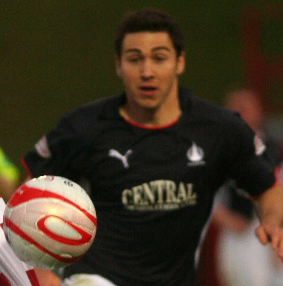 Carl Finnigan